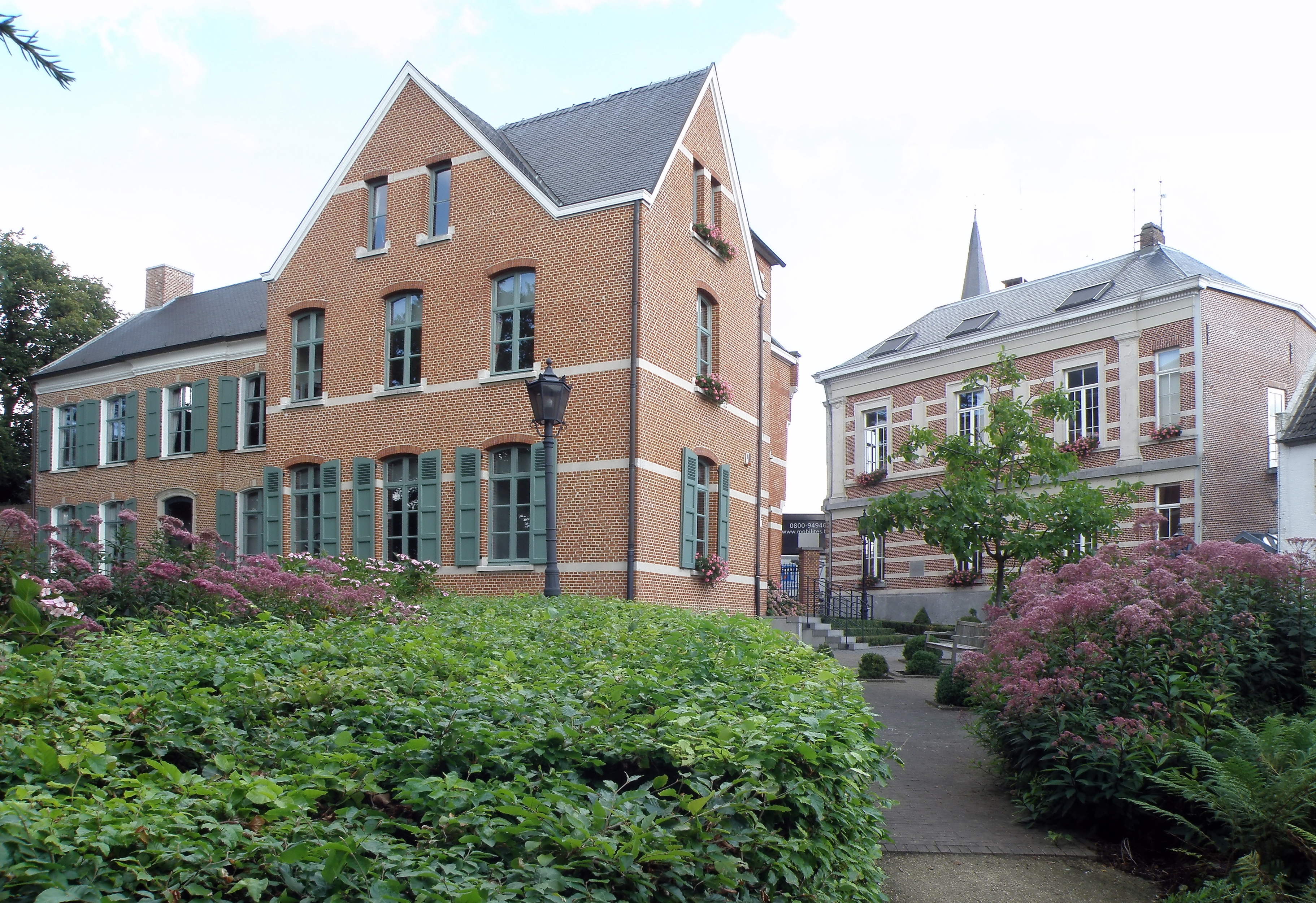 Heist-op-den-Berg, petite ville de la prov. d’Anvers, Belgique (région flamande), à 27km (à vol d’oiseau) au sud-est de la ville d’Anvers. À l'avant-plan, ancien presbytère, aujourd'hui utilisé par l’administration municipale, sis au n°15 Kerkplein (place de l’Église), au sommet de la butte (alt. 45m) sur laquelle la partie ancienne de la ville a été construite. Façade arrière (ouest, côté jardin) de l’édifice, lequel se compose de deux corps de bâtiment contigus: celui de droite (mur gouttereau, ici à gauche), édifié en 1769, mais restauré et remanié par l’archit. Léonard Blomme en 1891; celui de gauche (mur pignon, à droite sur la photo), d’équerre par rapport au premier, construit dans le même style (néo-traditionnel), selon des plans du même Léonard Blomme fin XIXe siècle. Au second plan à droite : bâtiment de style néo-classique (façade latérale), anciennement justice de paix, aujourd'hui incorporé à la maison communale (=mairie) qui le jouxte à sa gauche ; ég. œuvre de l’archit. Léonard Blomme, de 1867.